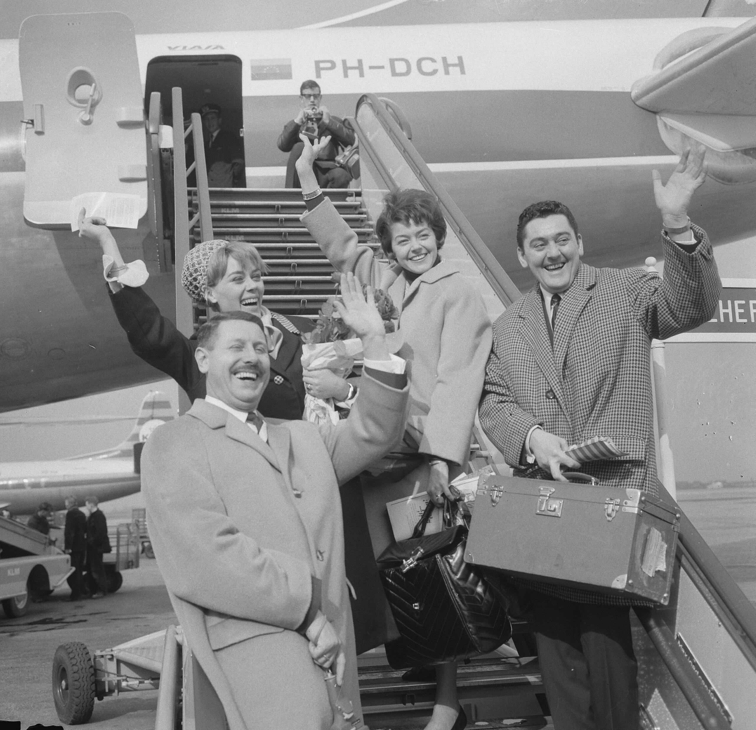 Collectie / Archief : Fotocollectie Anefo Reportage / Serie : [ onbekend ] Beschrijving : Conny Vandenbos van Schiphol naar Napels vertrokken voor Eurovisie Songfestival 1965, De Nederlandse ploeg v.l.n.r. Johnny Holshuizen , Conny van de Bosch , Teddy Scholten en Wim van der Beek Datum : 17 maart 1965 Locatie : Noord-Holland, Schiphol Trefwoorden : artiesten, muziek, songfestivals, vliegvelden Persoonsnaam : Holshuizen Johnny, Scholten, Teddy, Vandenbos, Conny Fotograaf : Evers, Joost / Anefo Auteursrechthebbende : Nationaal Archief Materiaalsoort : Negatief (zwart/wit) Nummer archiefinventaris : bekijk toegang 2.24.01.03 Bestanddeelnummer : 917-5518